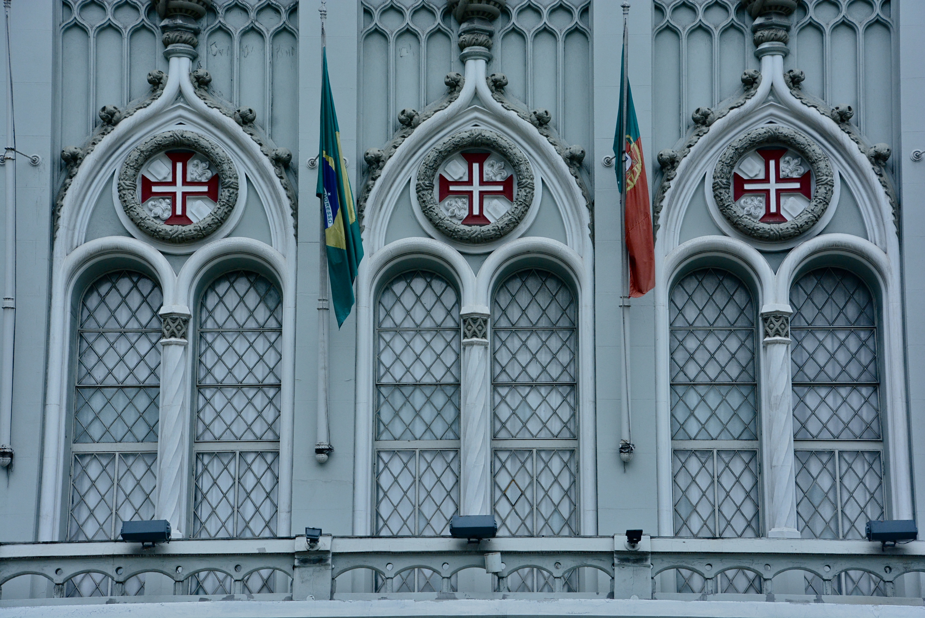 Neomanueline-style windows of the Liceu Literário Português in Rio de Janeiro, Brazil